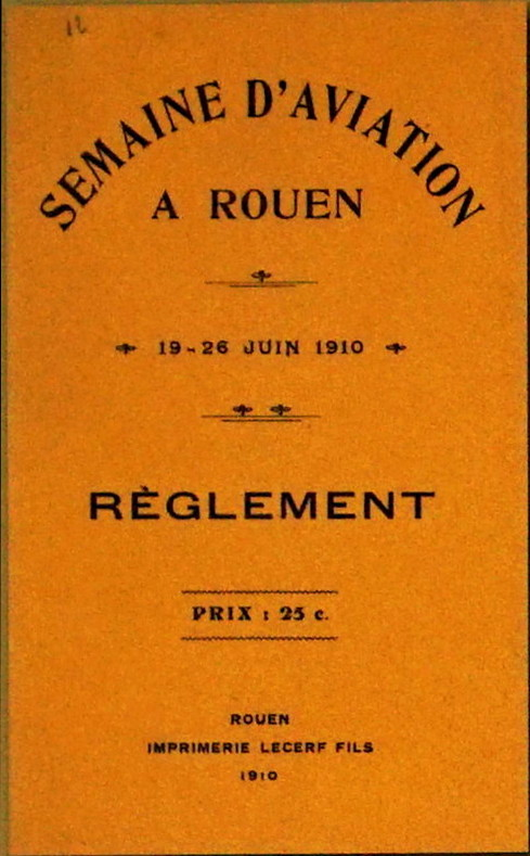 lors de la Grande Semaine d'Aviation de Rouen de 1910.